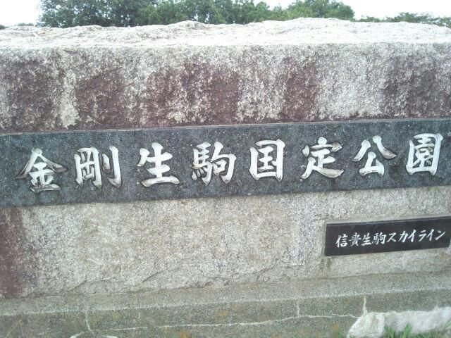 金剛生駒紀泉国定公園を表す碑(信貴生駒スカイラインにて)